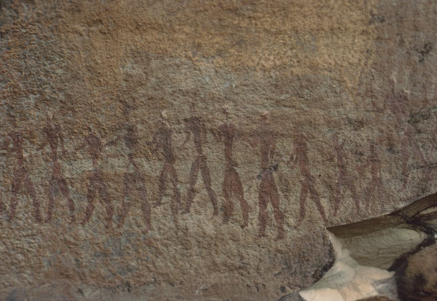 Pitture rupestri. Figure umane.